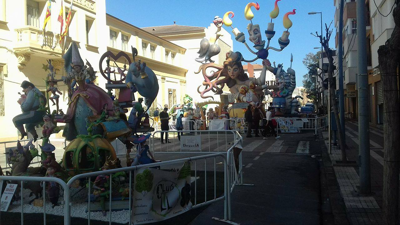 Falles de Borriana, 2017. This is a photography of a Folklore festival in Spain (Wikidata id Q23663119).